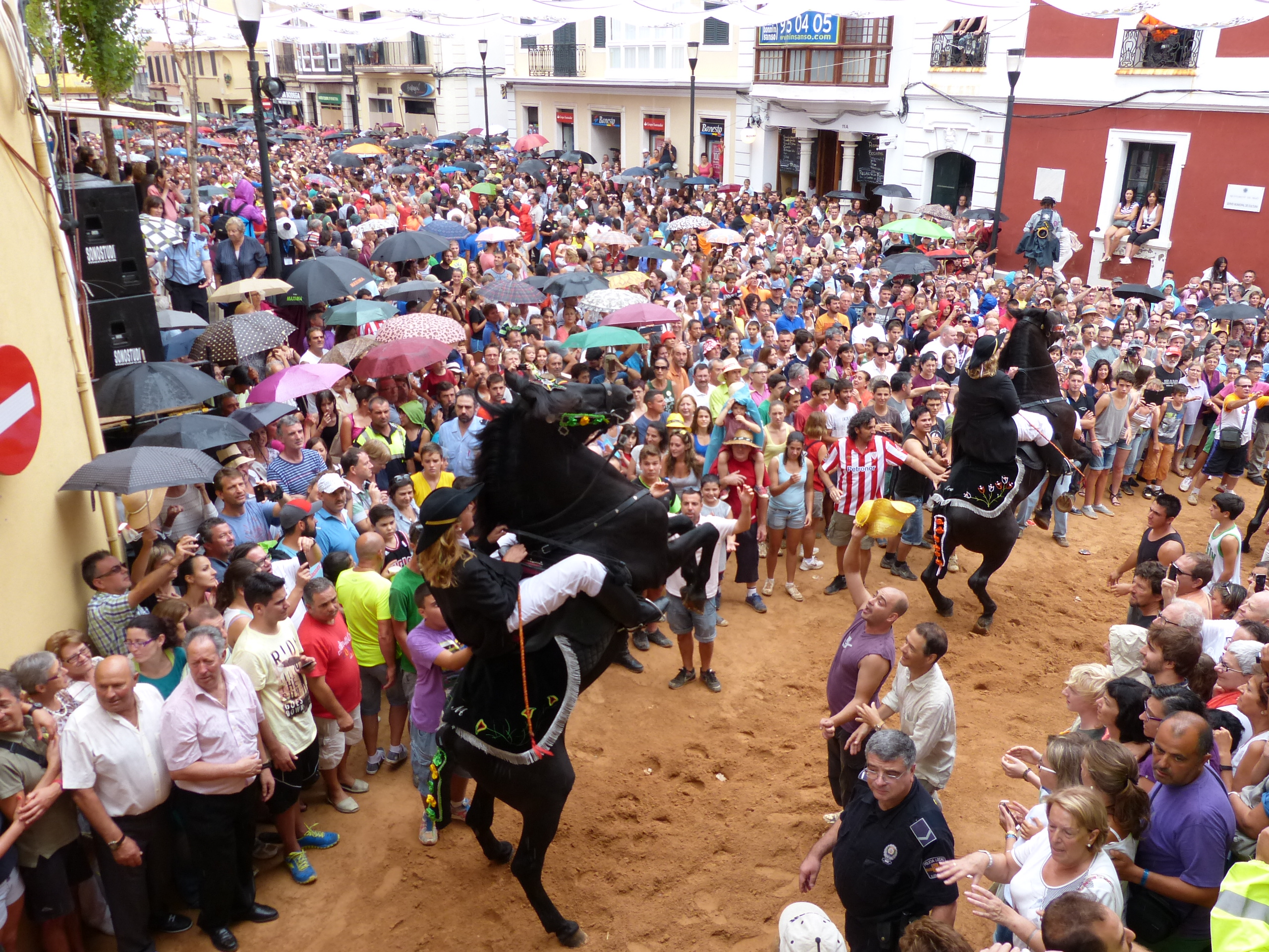 Fiestas de la Virgen de Gracia This is a photography of a Folklore festival in Spain (Wikidata id Q13258770).